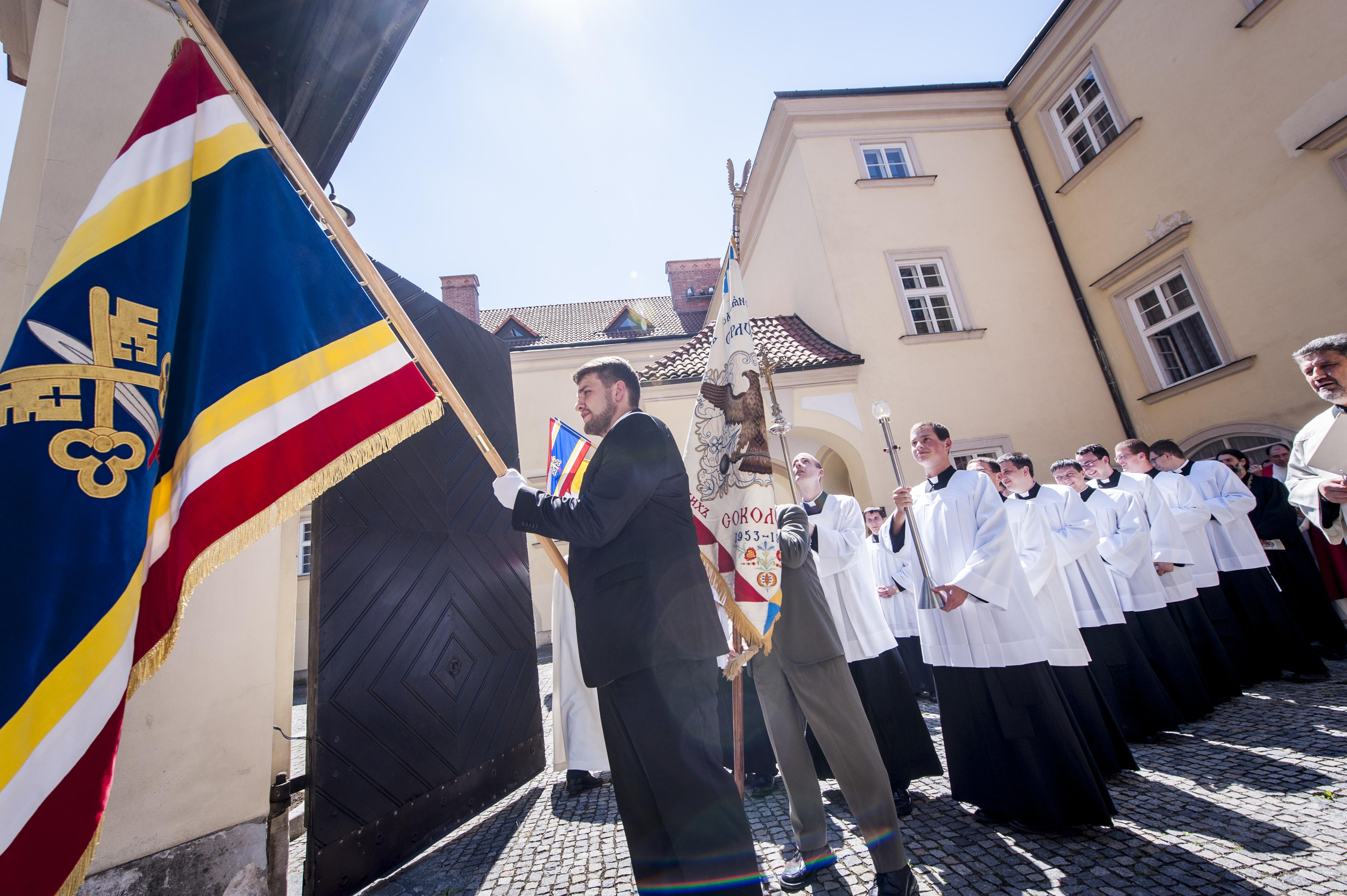 Fotografie z biskupského svěcení Pavla Konzbula v Brně 29. června 2016. Autor: Vít Kobza